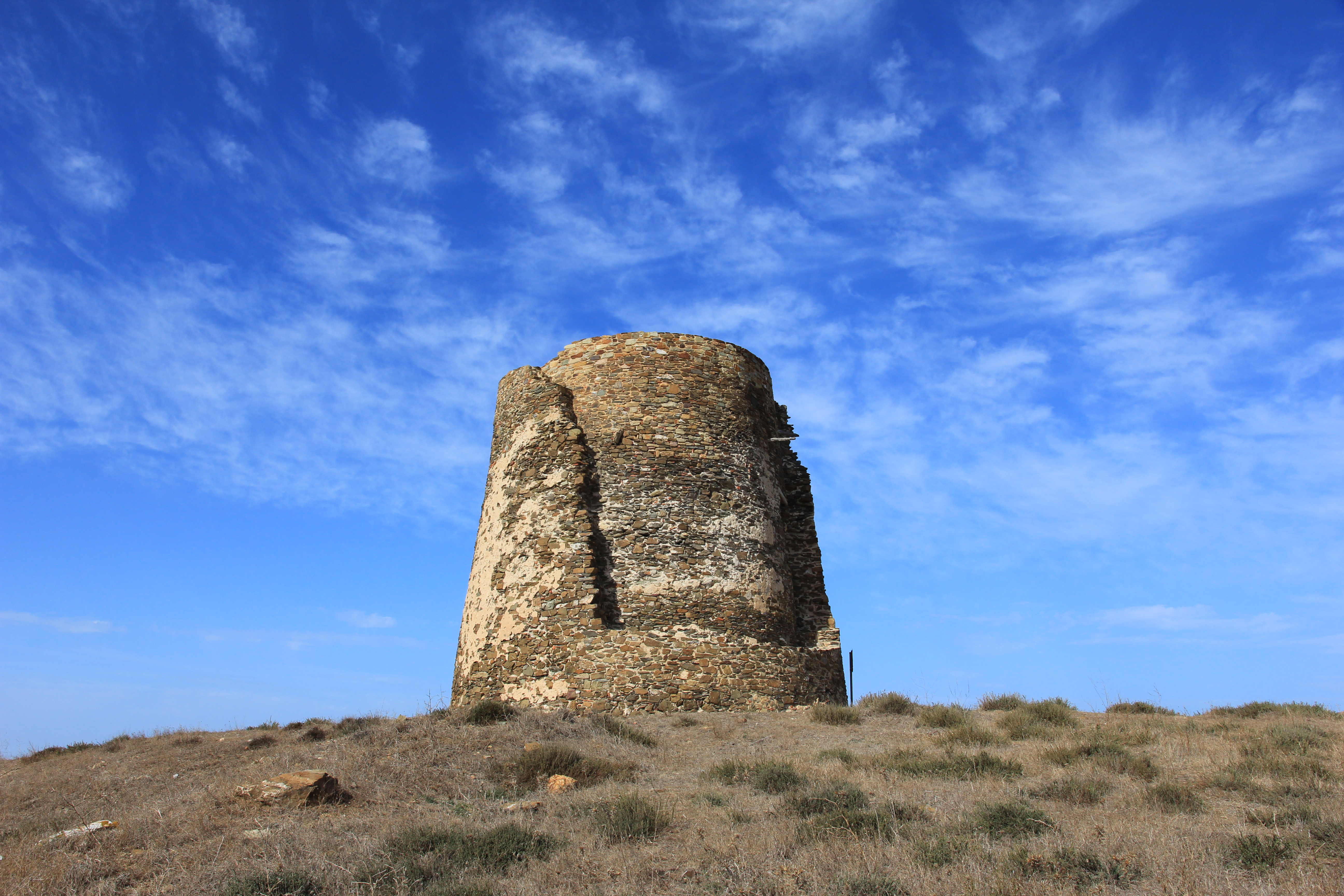 Arbus - Torre di Flumentorgiu